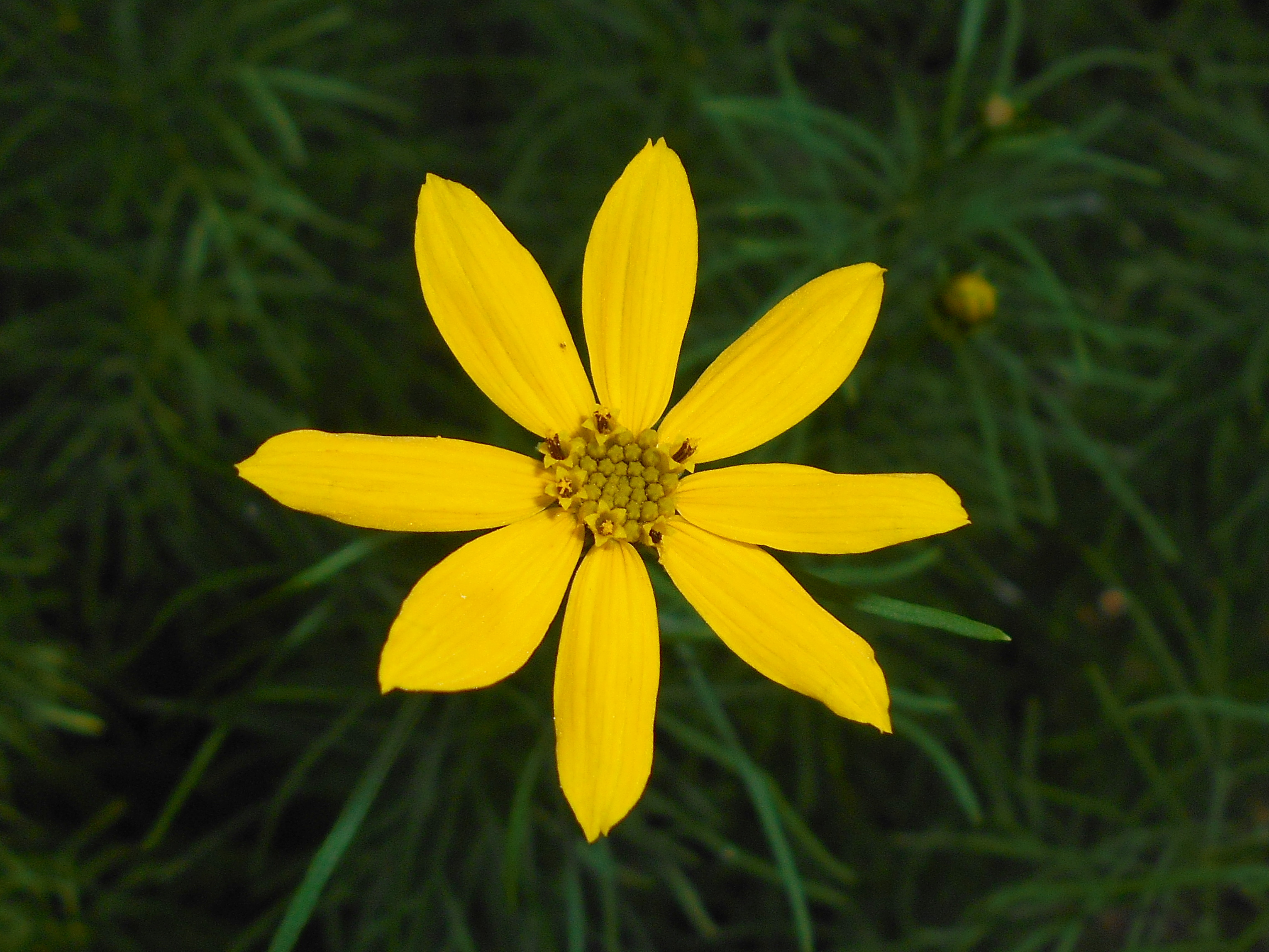 Nachyłek okółkowy (Coreopsis verticillata), Ogród Botaniczny UMCS w Lublinie.